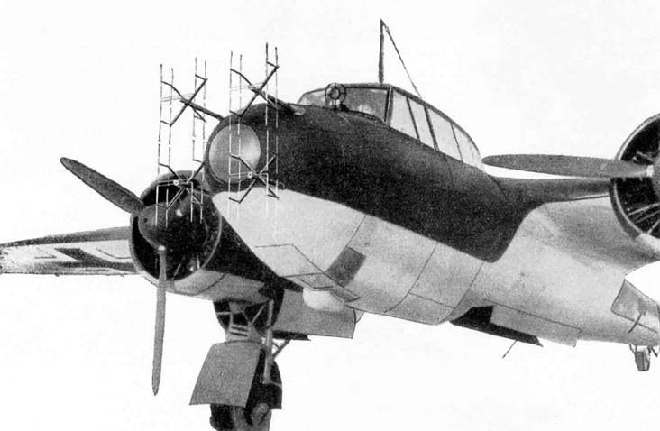 Lichtenstein b/c Radar Anordnung der Antenne an der Flugzeugkanzel einer Do 17 Z-10 Kauz II ITU-classificatio: Radiolocation land station in the radiolocation service